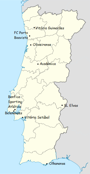 carta das clubes participantes do campeonato de portugal de futebol de primeira divisao de 1945-1946